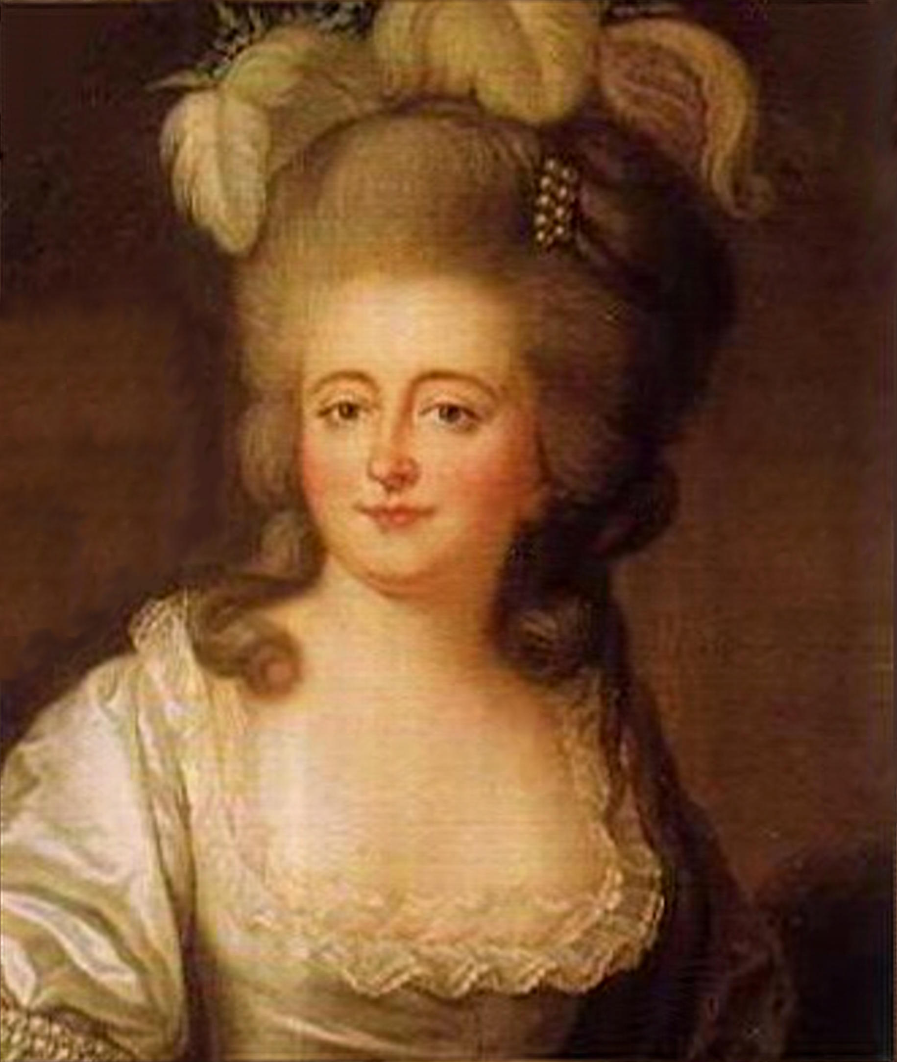 Madame de Montesson. portrait par Mme Vigée-Lebrun